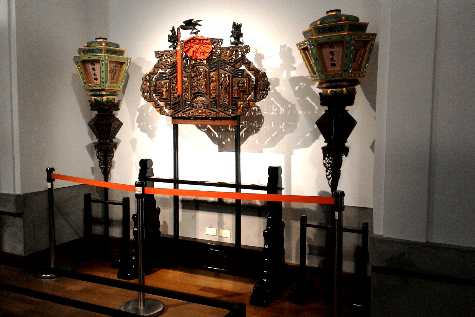 大溪武德殿內展示的彩牌與燈凸,桃園市大溪區興和里